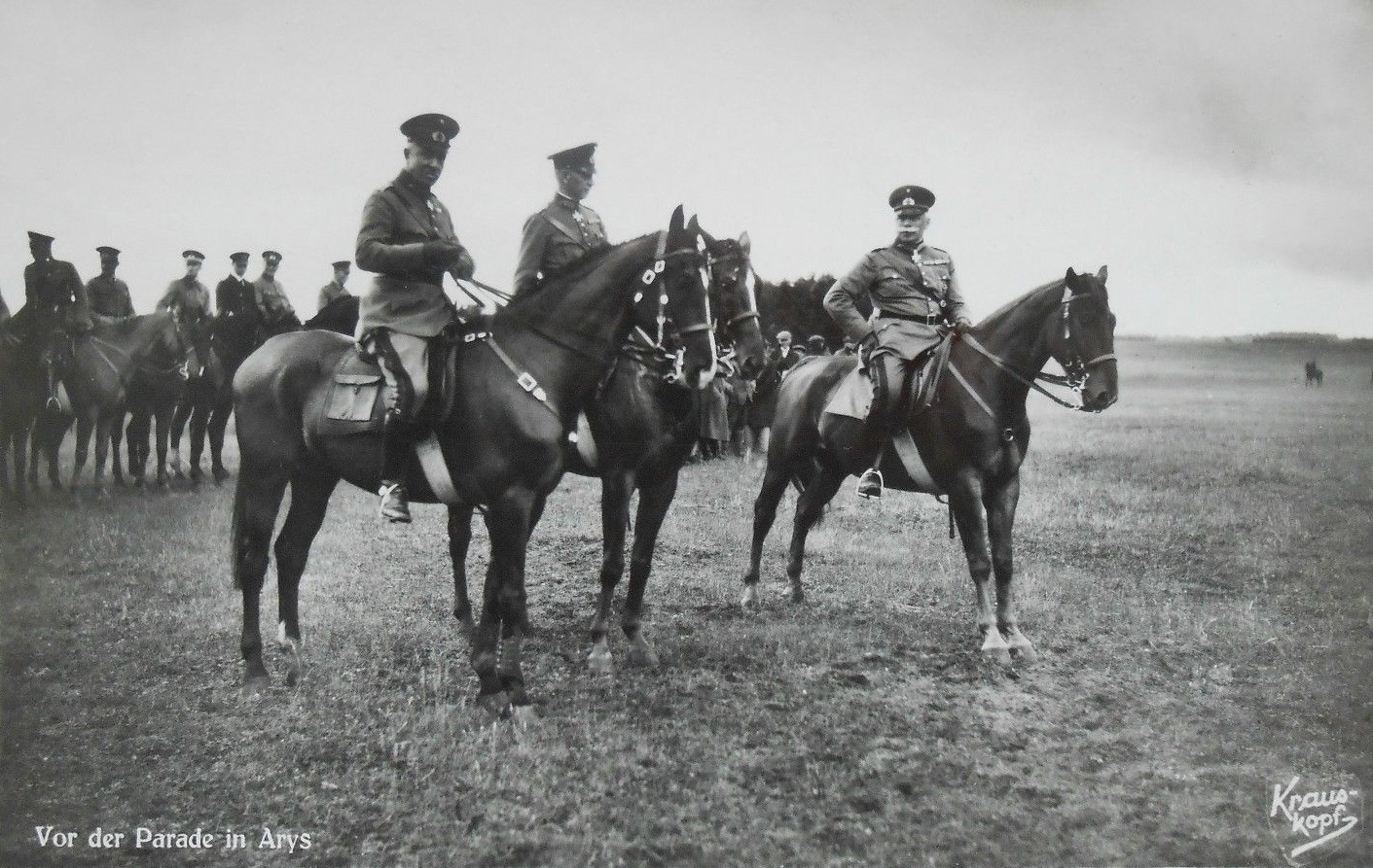 Hermann von François (rechts) und Richard von Conta (links) auf der Abschlussparade der Heeresübung der 1. Division in Arys vom 27. April bis zum 26. Mai 1914